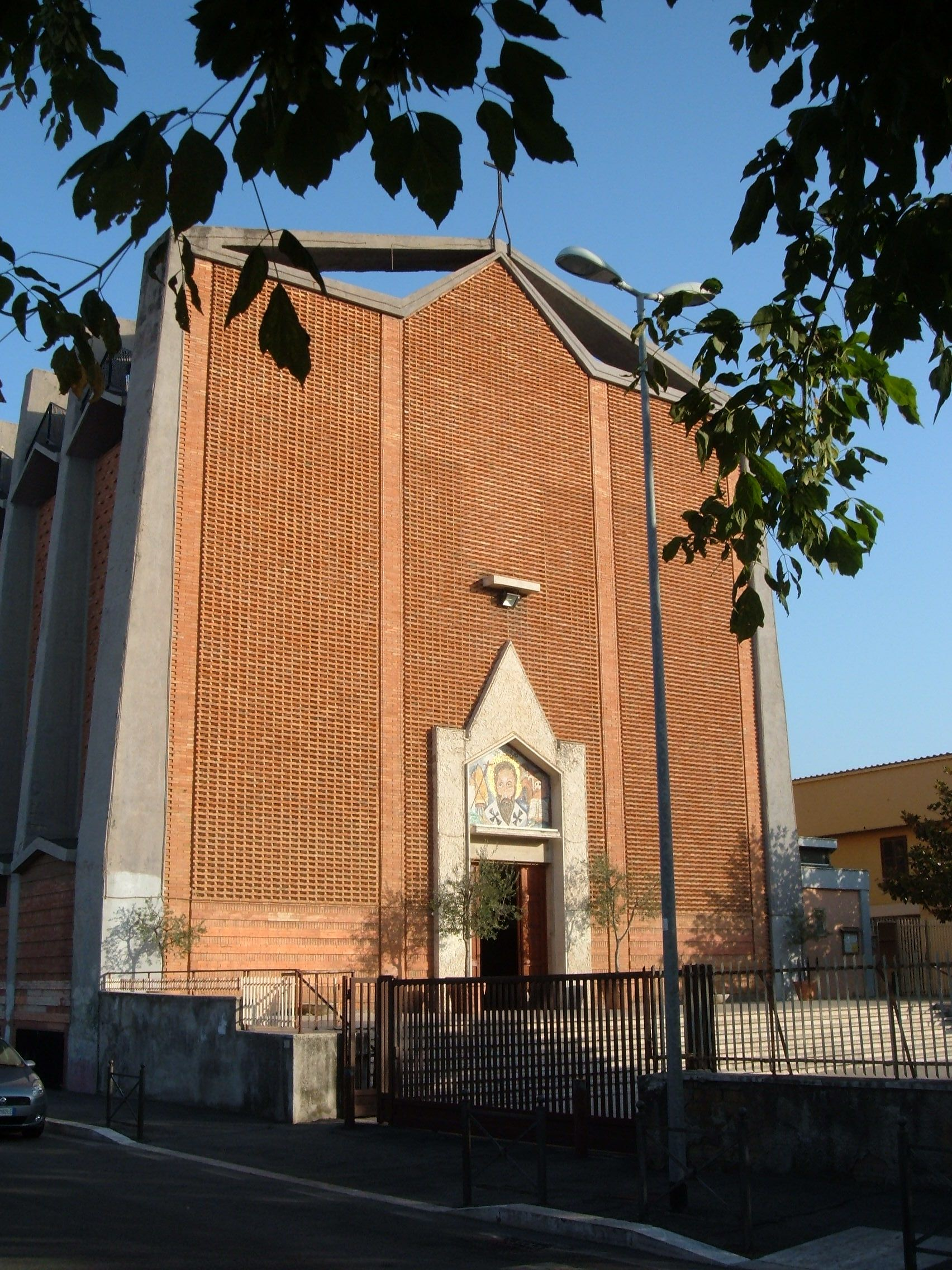 Chiesa di San Basilio, a Roma, nel quartiere San Basilio, in piazzale Recanati.